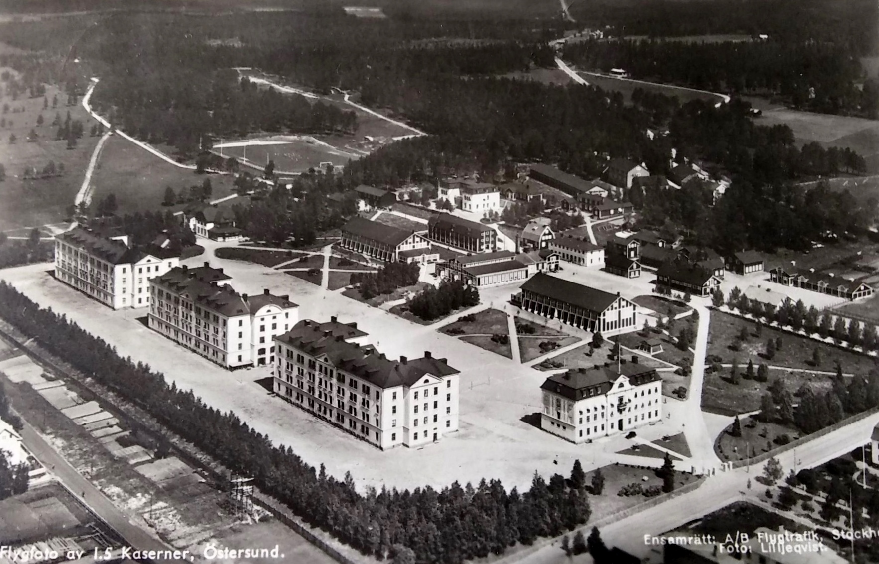 Kasernetablissementet vid Fältjägargränd i Östersund.